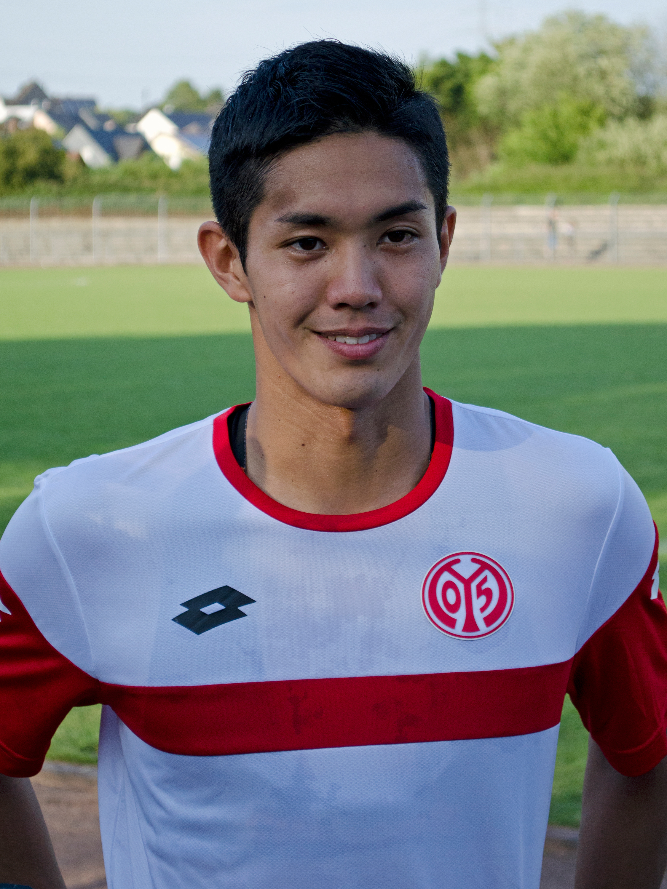 Yoshinori Mutō, japanischer Fußballspieler